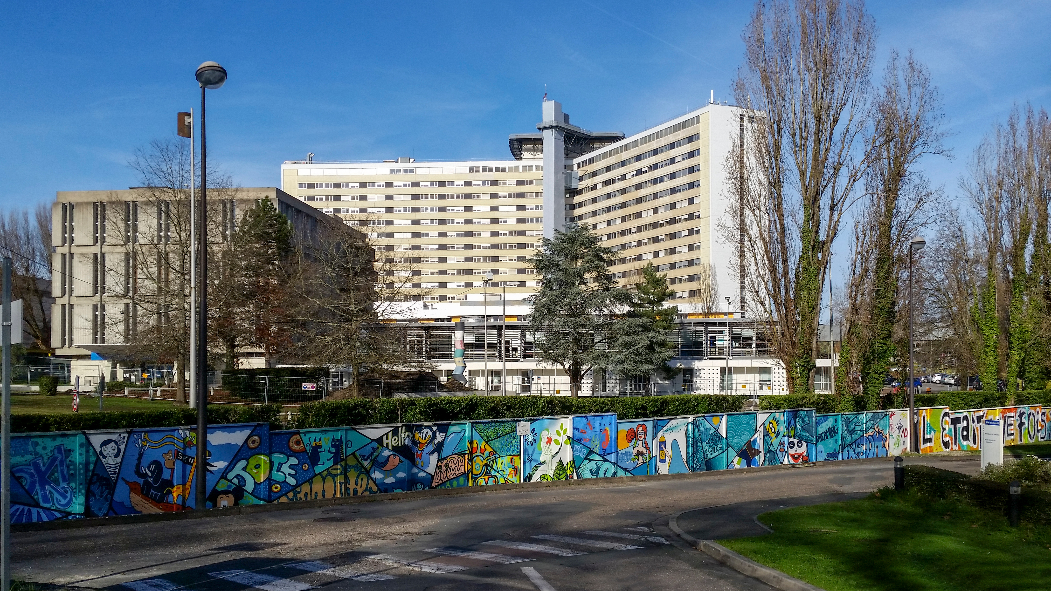 ChPerrens - tripode